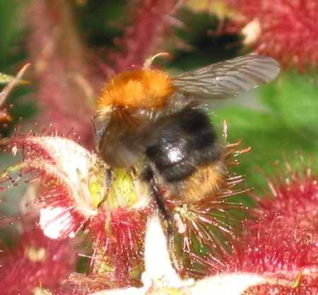 zelfgemaakte foto van Akkerhommel donkere vorm; eind juni